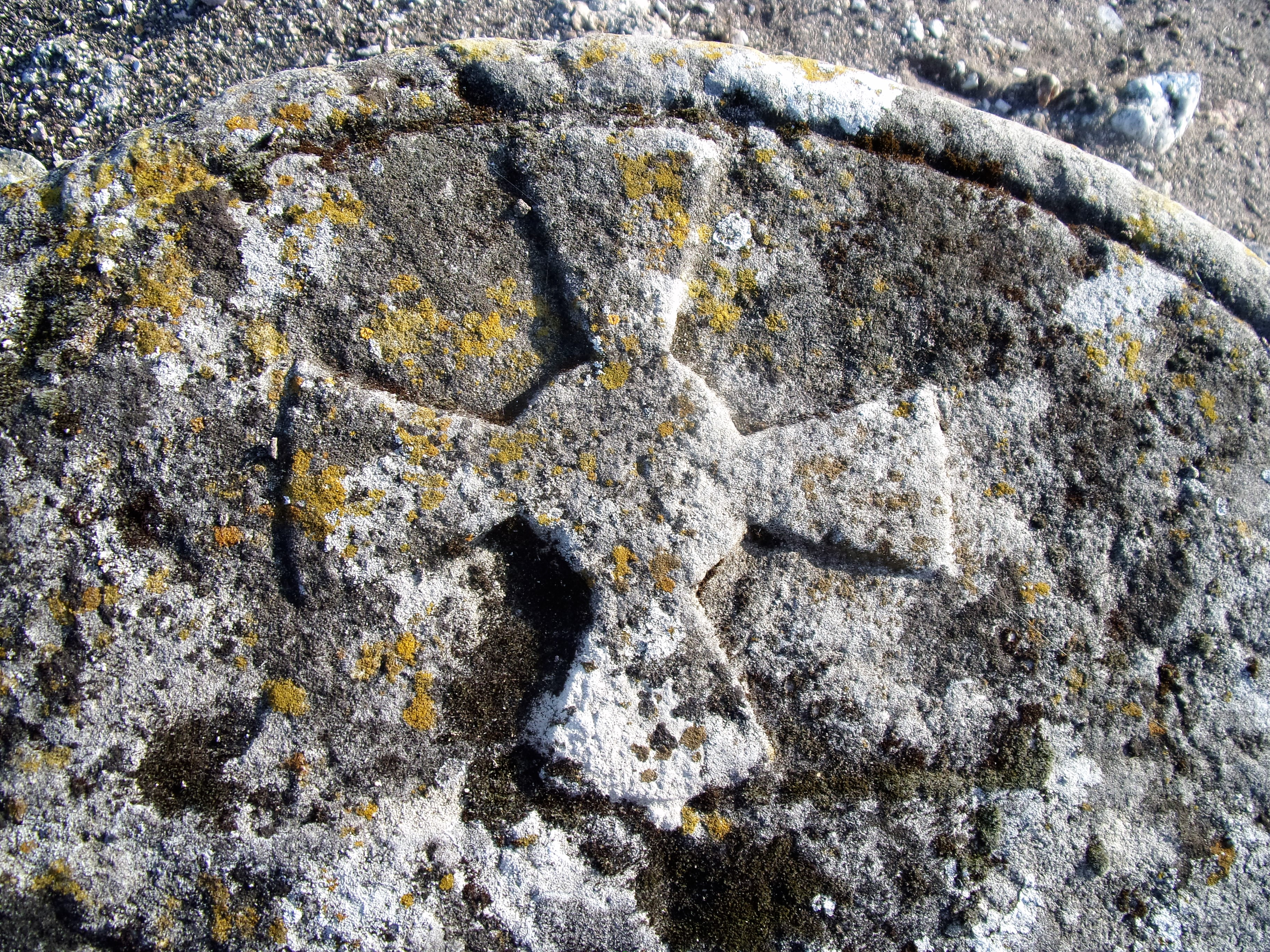 Croix de malte sur la pierre d'autel de la lanterne des morts de Cormery